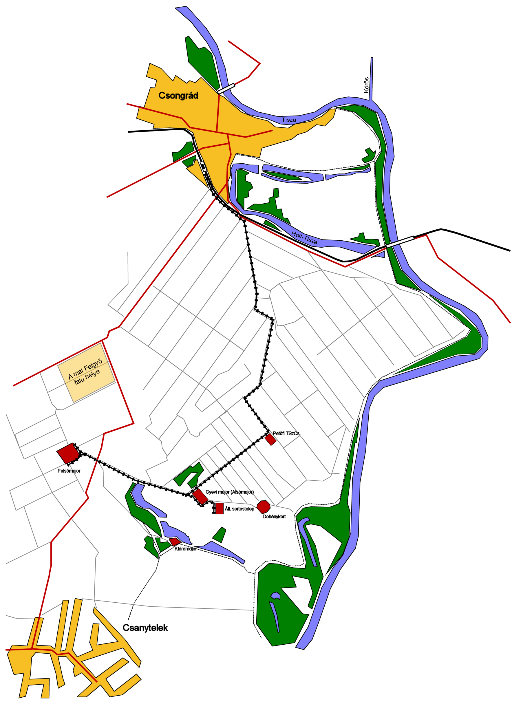 A Csongrád–felgyői Gazdasági Vasút térképvázlata